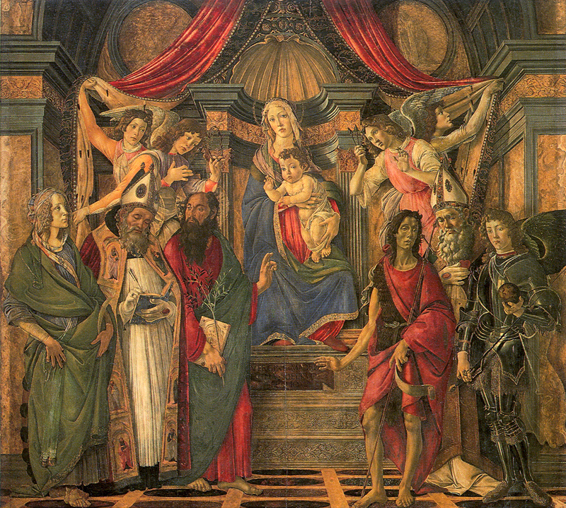 San Barnaba Altarpiece